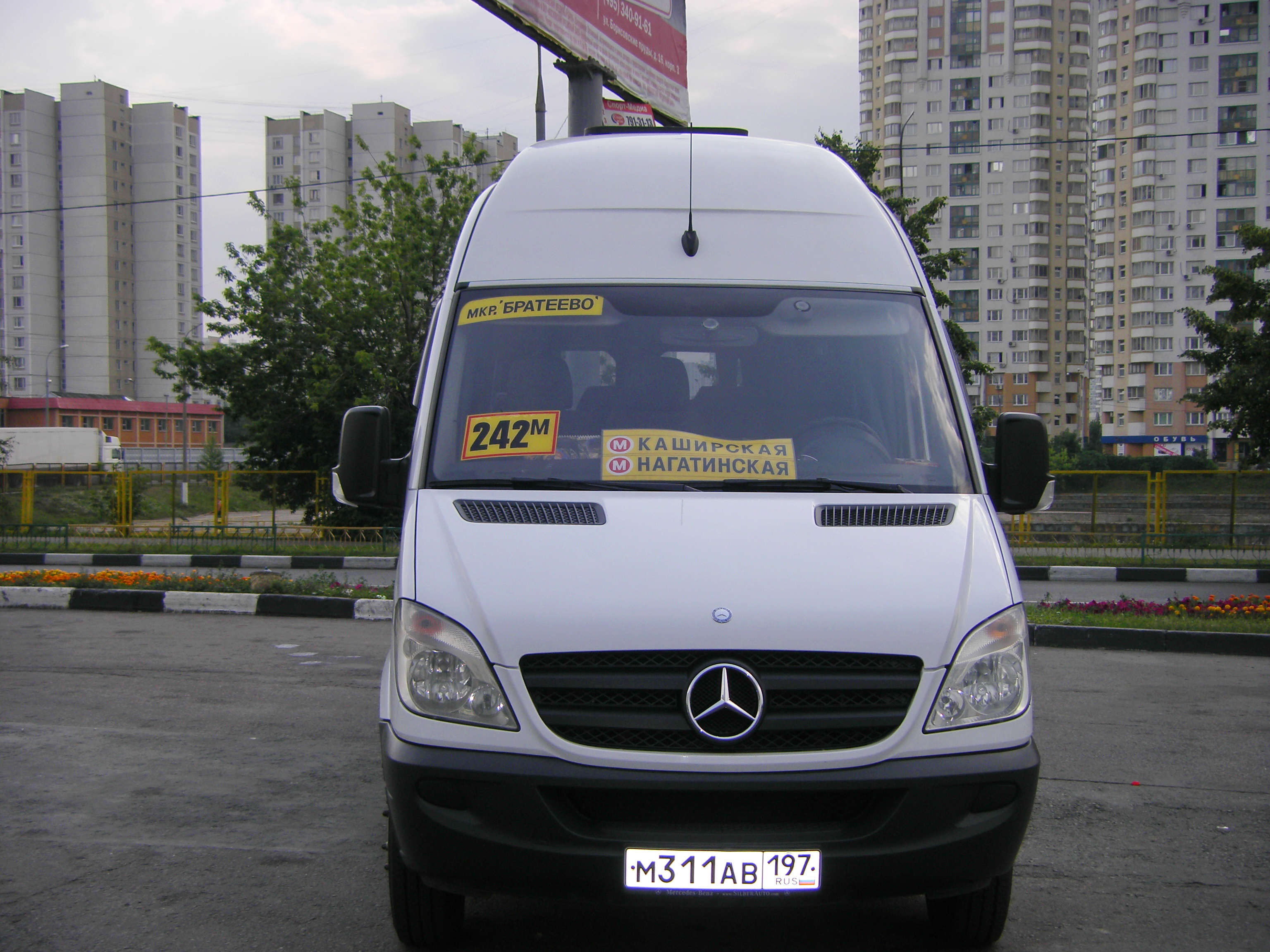 фотография маршрутки № 242м (Москва, район Братеево, 2011 год)